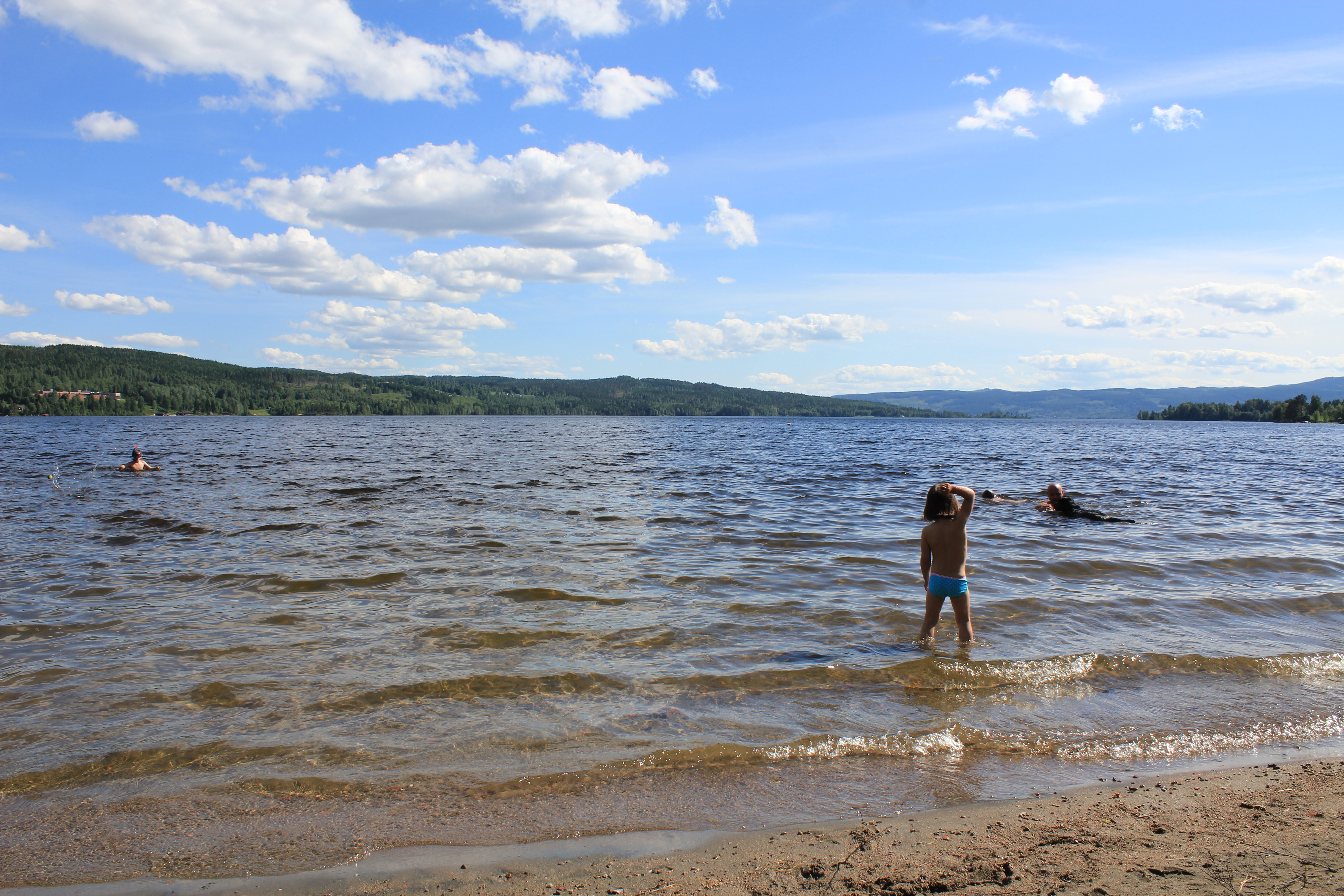 Badeplassen ved Meierisvingen ved Hurdalssjøen.